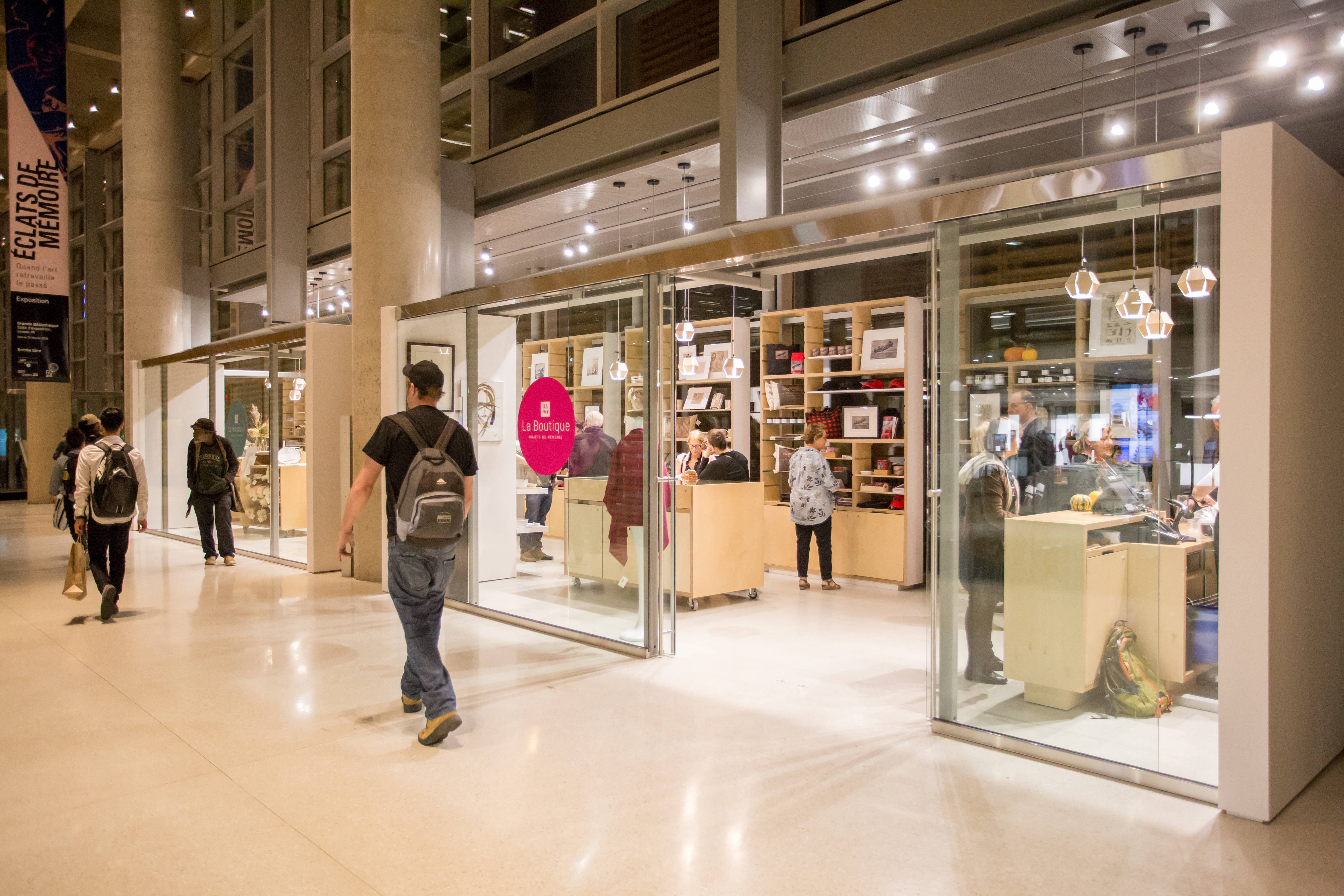 Boutique de Bibliothèque et Archives nationales du Québec située au sein de la Grande Bibliothèque à Montréal.